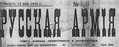 Официоз "Русская армия".